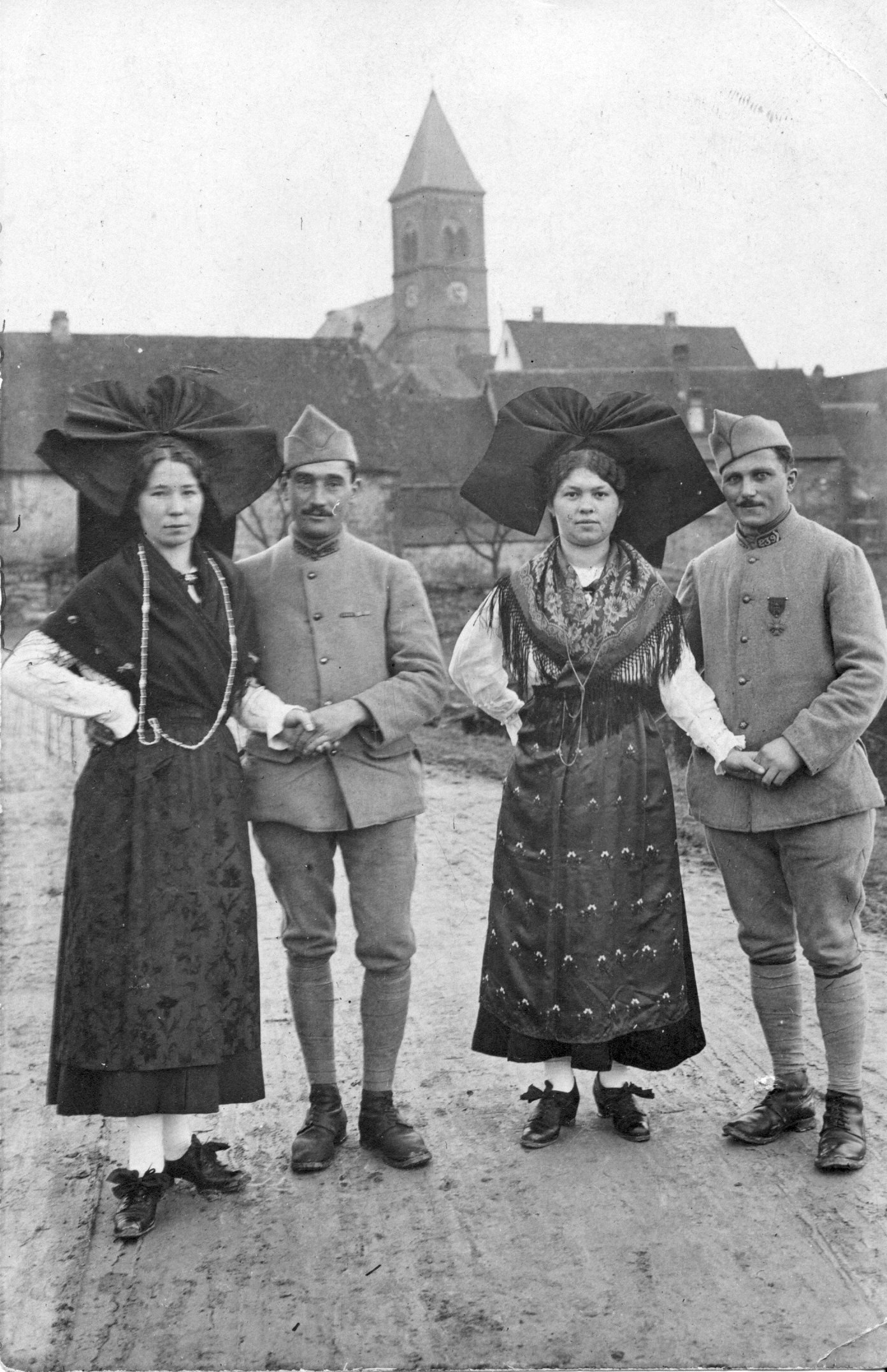 l'armée française victorieuse occupe l'Alsace qui réintègre la France après le traité de Versailles-Un artilleur du 15° régiment d'artillerie-155CTR-un fantassin du 239°